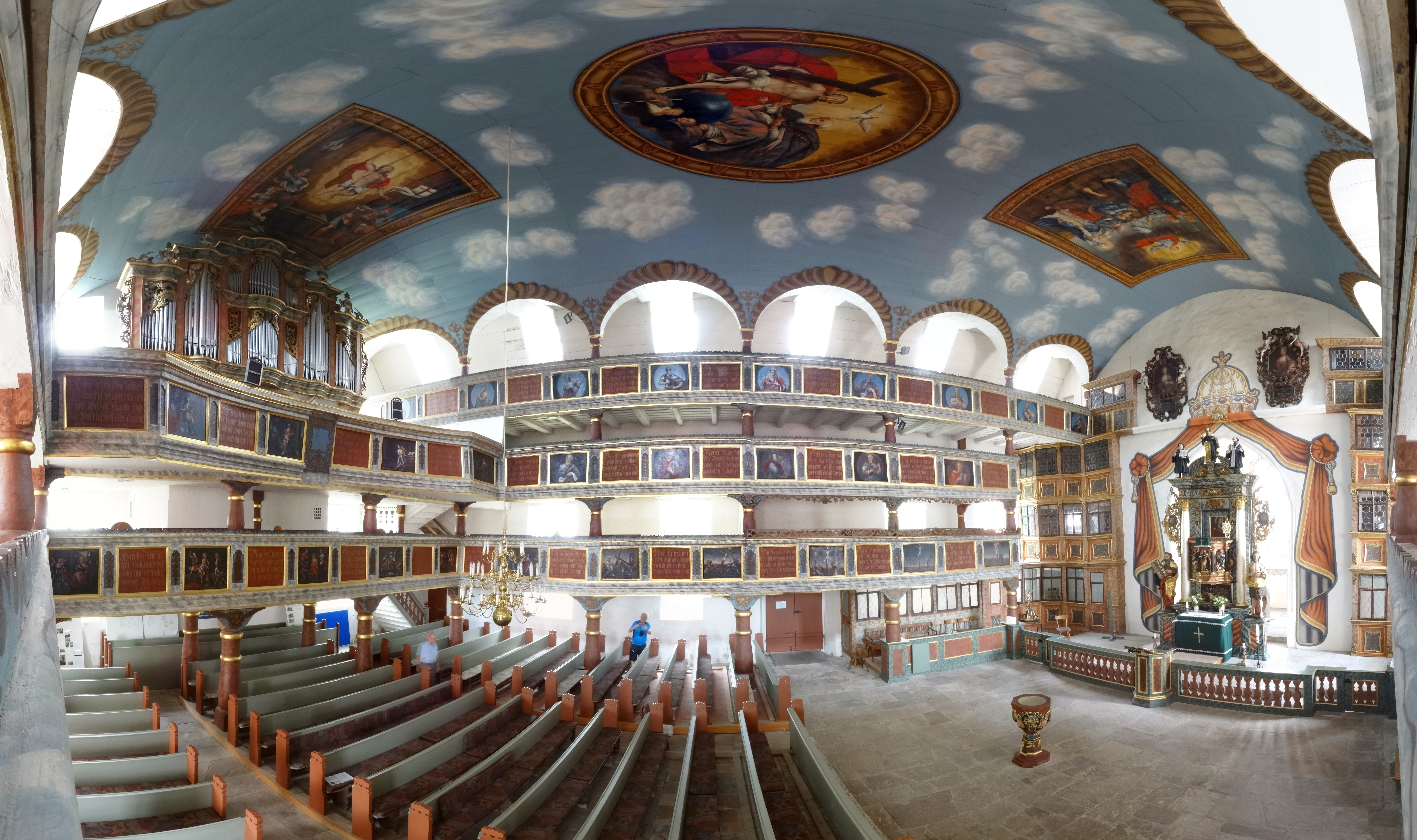 Dom der Rhön, Innenraumpanorama